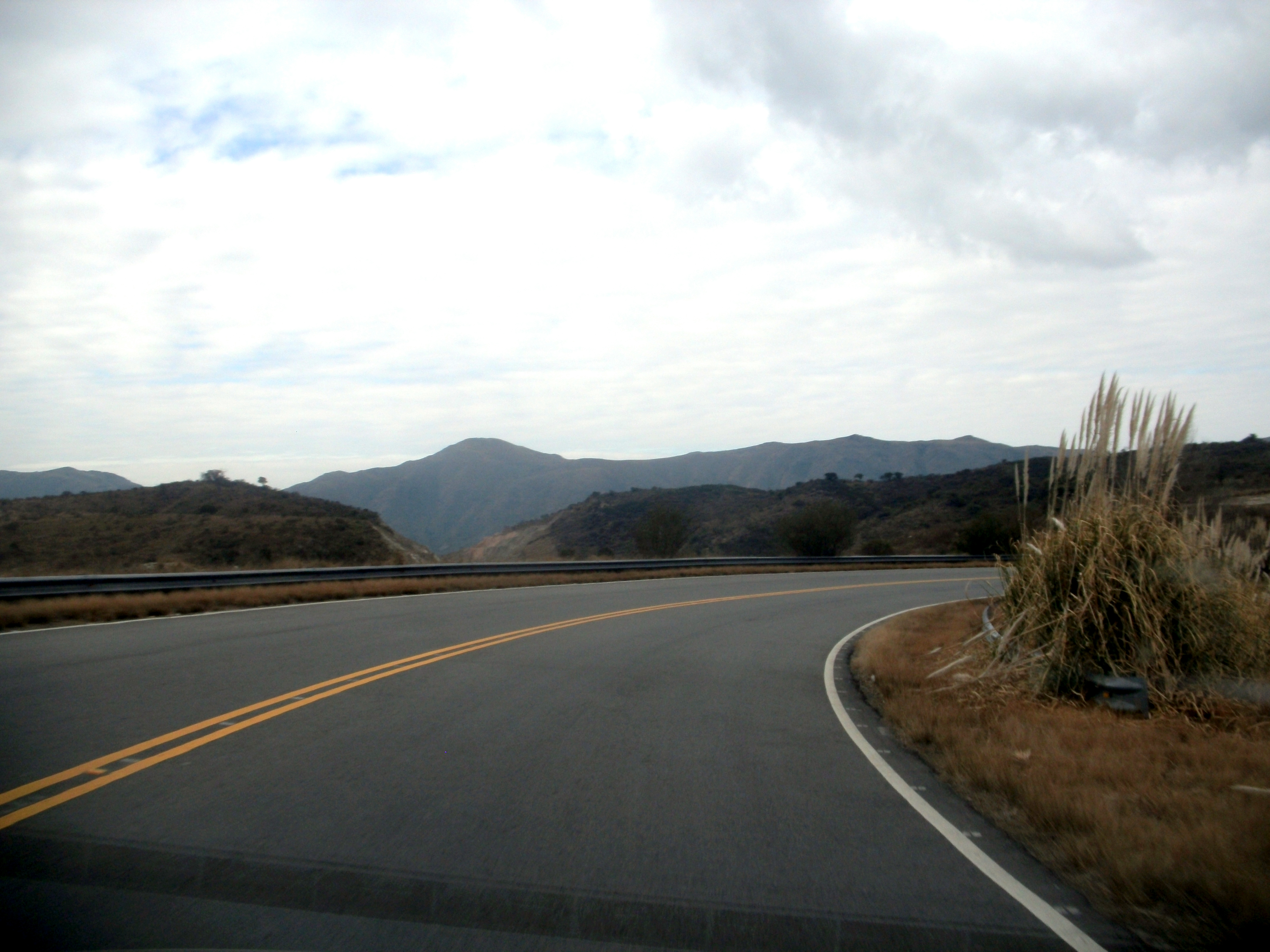 La Ruta intercala planicies con cumbres